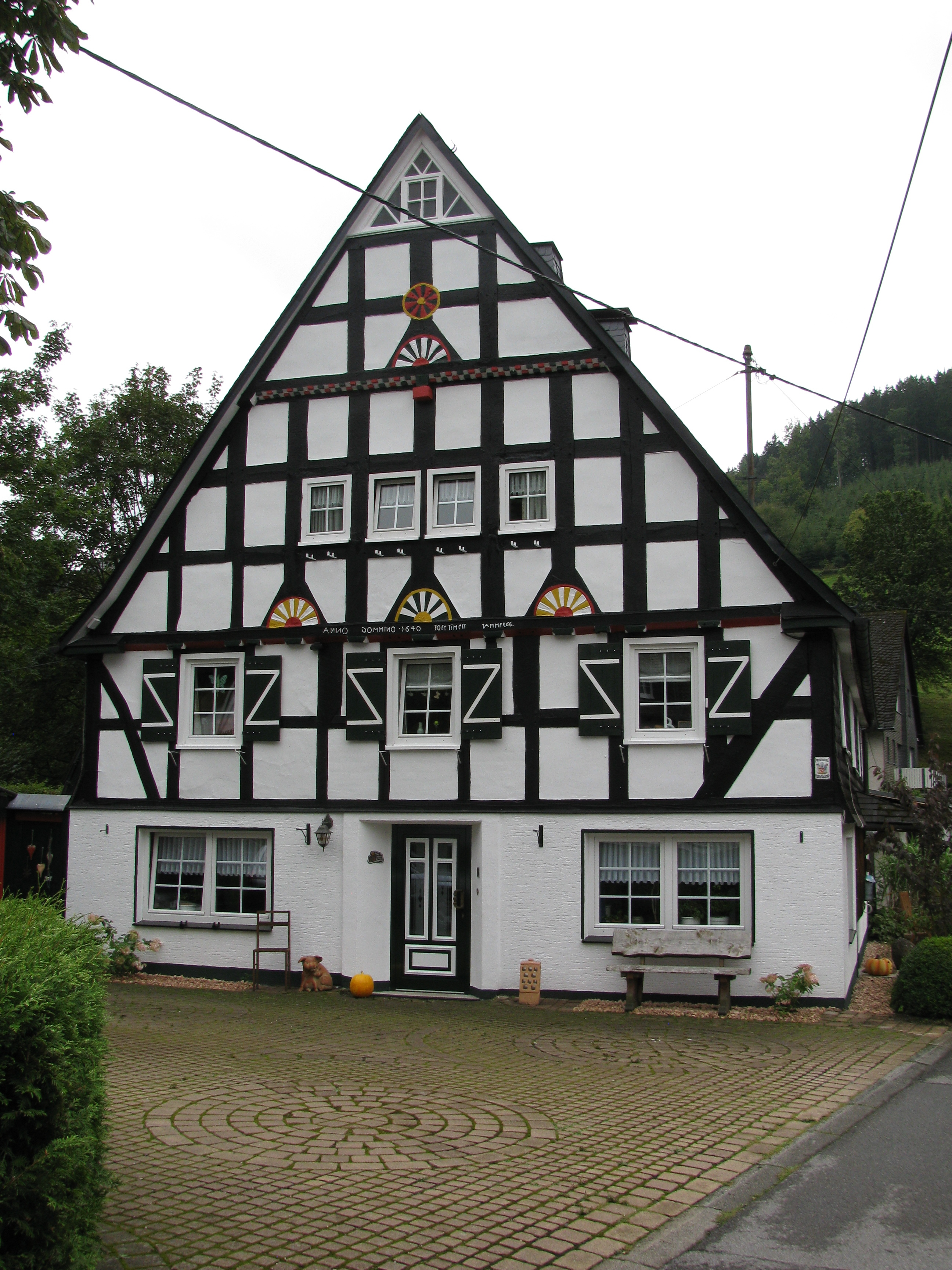 das Haus Gartenweg 1 in Schmallenberg-Lenne